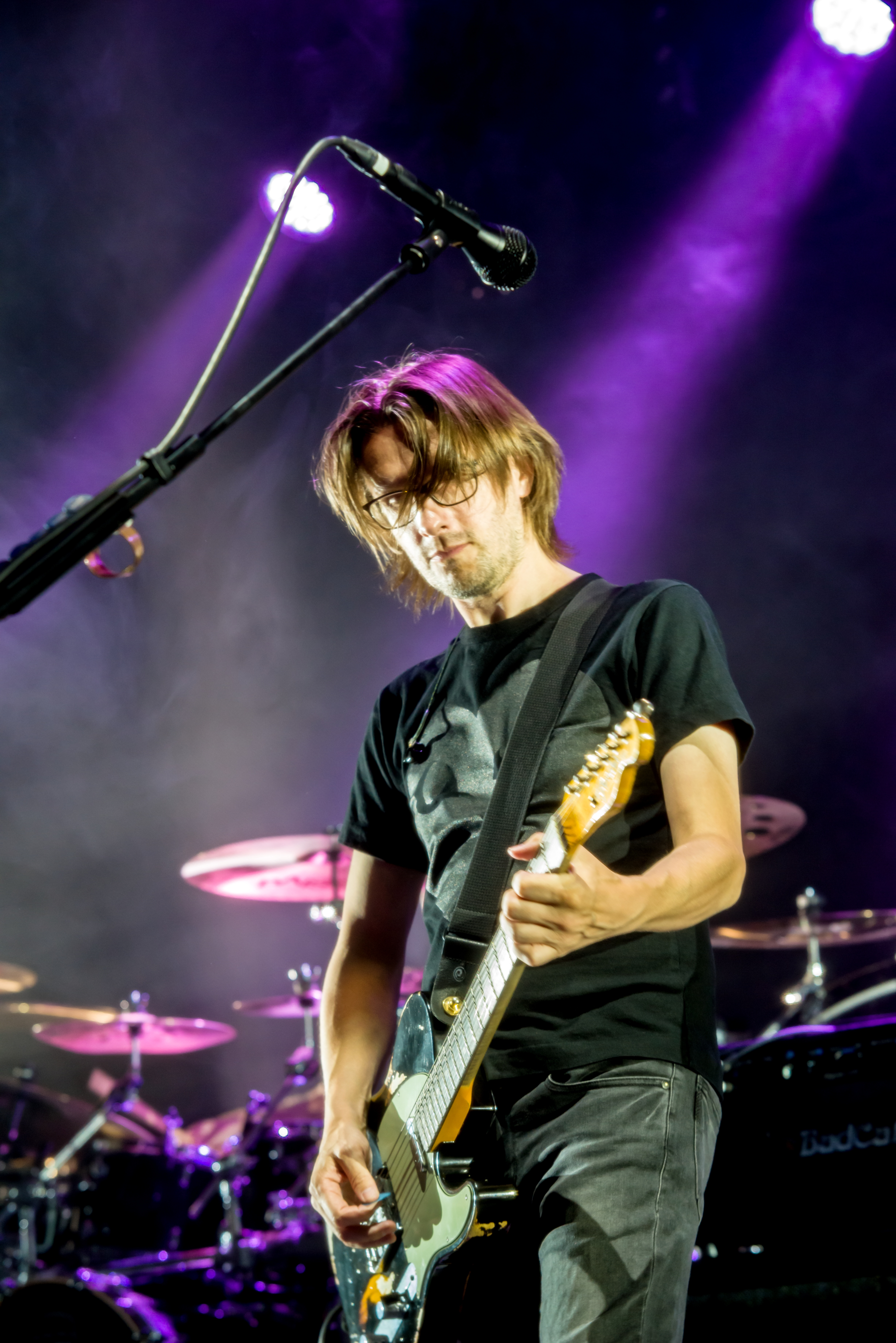 Bilder vom Zelt Musik Festival 2018 in Freiburg im Breisgau Das Eröffnungskonzert mit Steven Wilson